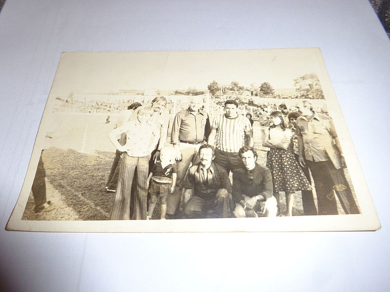 Garrincha com o Coronel do Exército Brasileiro Carlos F. Saraiva em data não identificada.